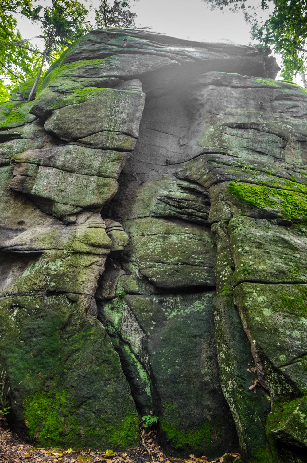 Přírodní památka Píšťala, vrcholová část lokality, okres Jeseník